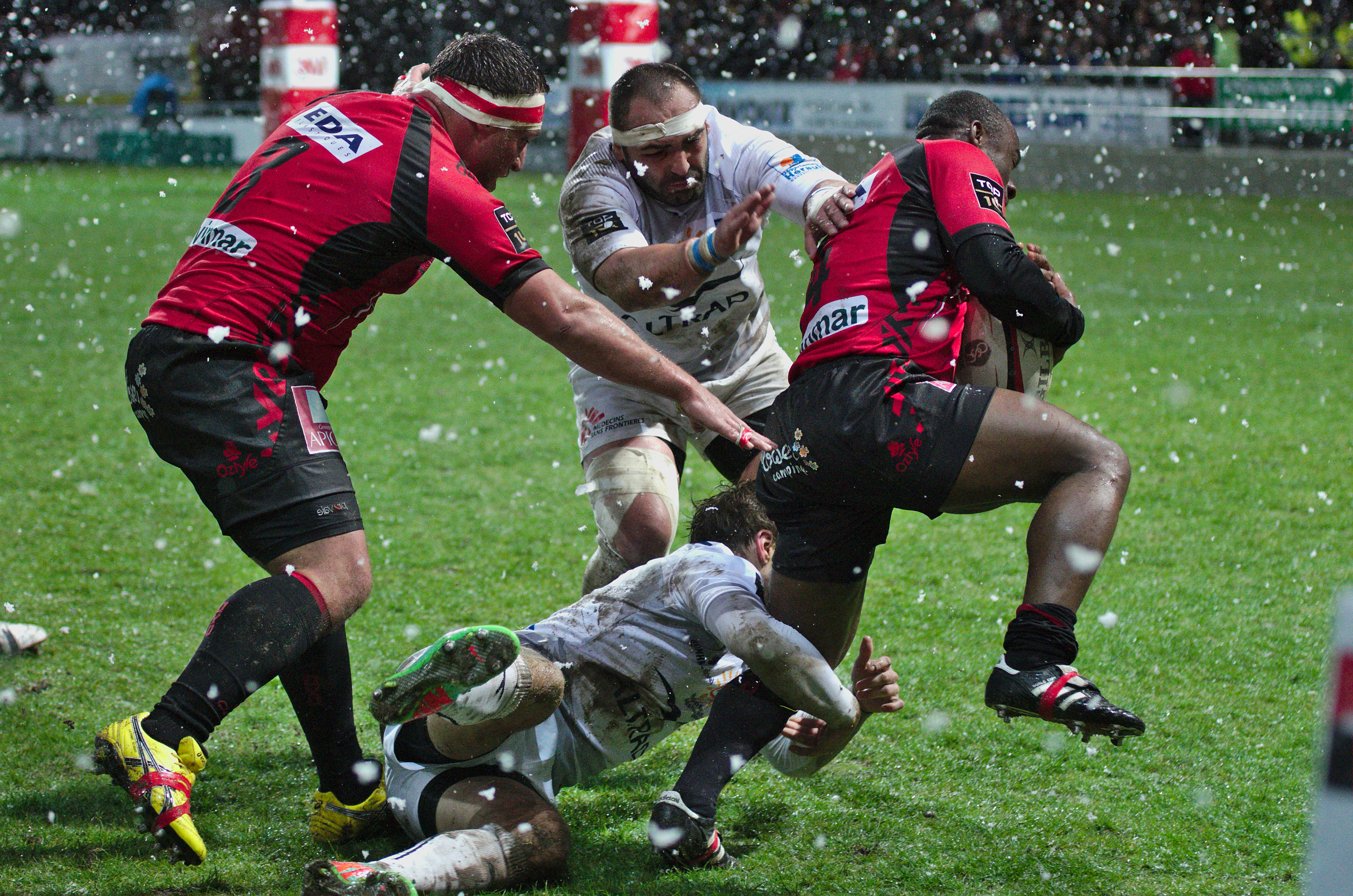 USO-MHR - 20140324 - Plaquage